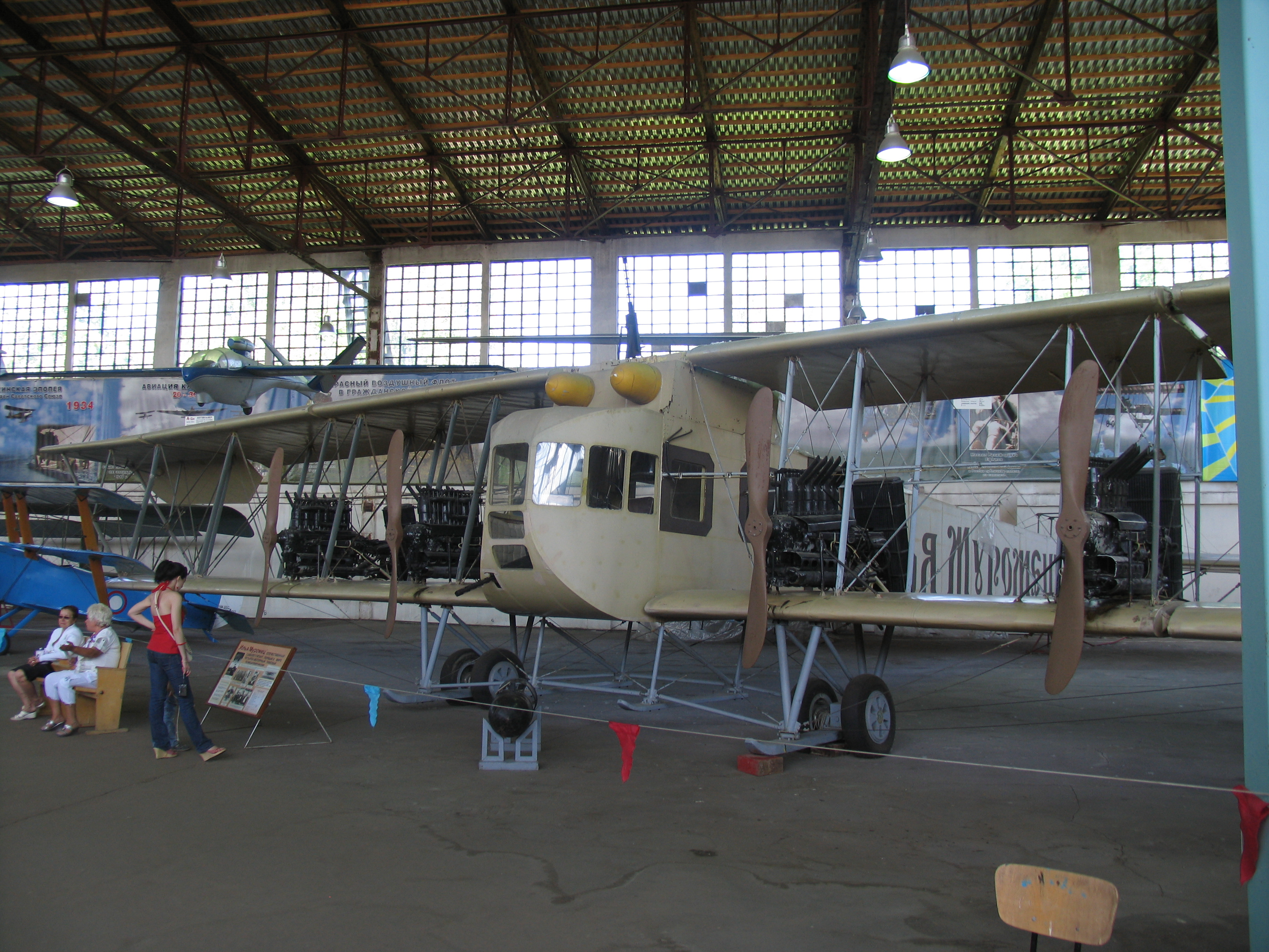 С-22 "Илья Муромец". Центральный музей ВВС.